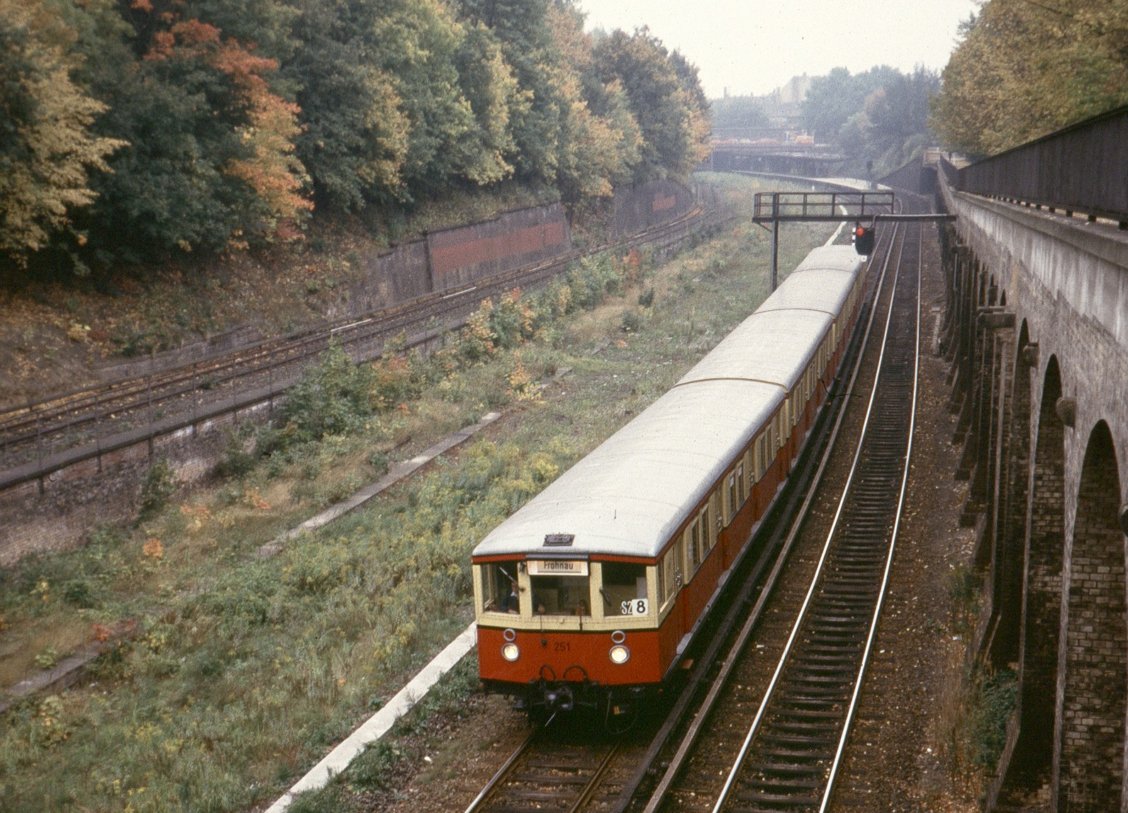 Halbzug der Baureihe ET 165 bei der BVG